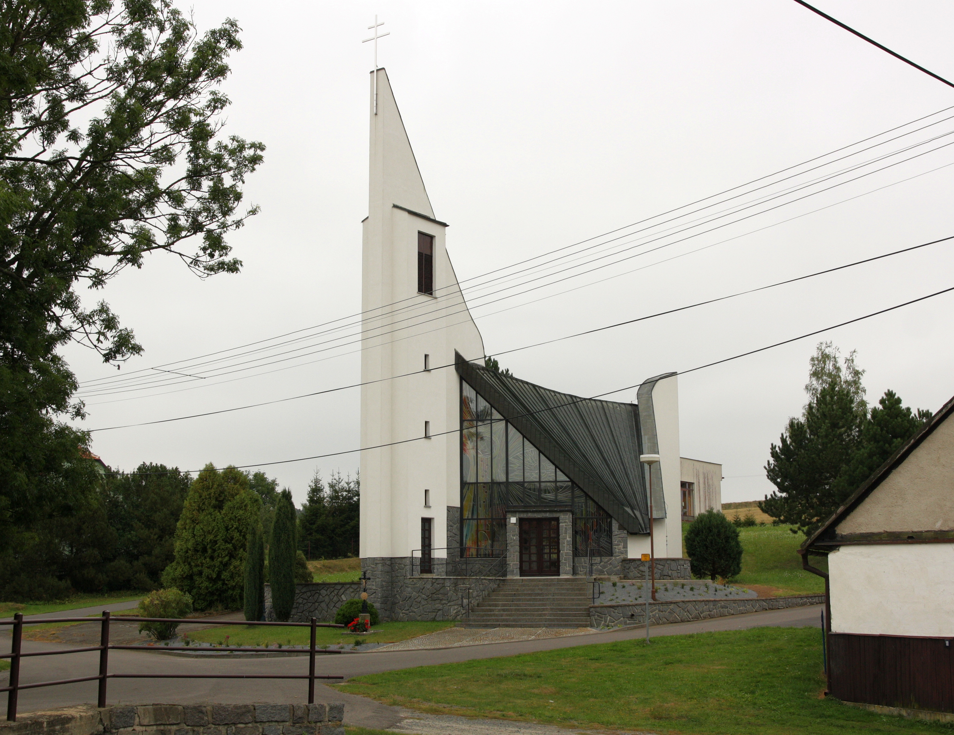 Horní Libochová - kaple svaté Ludmily